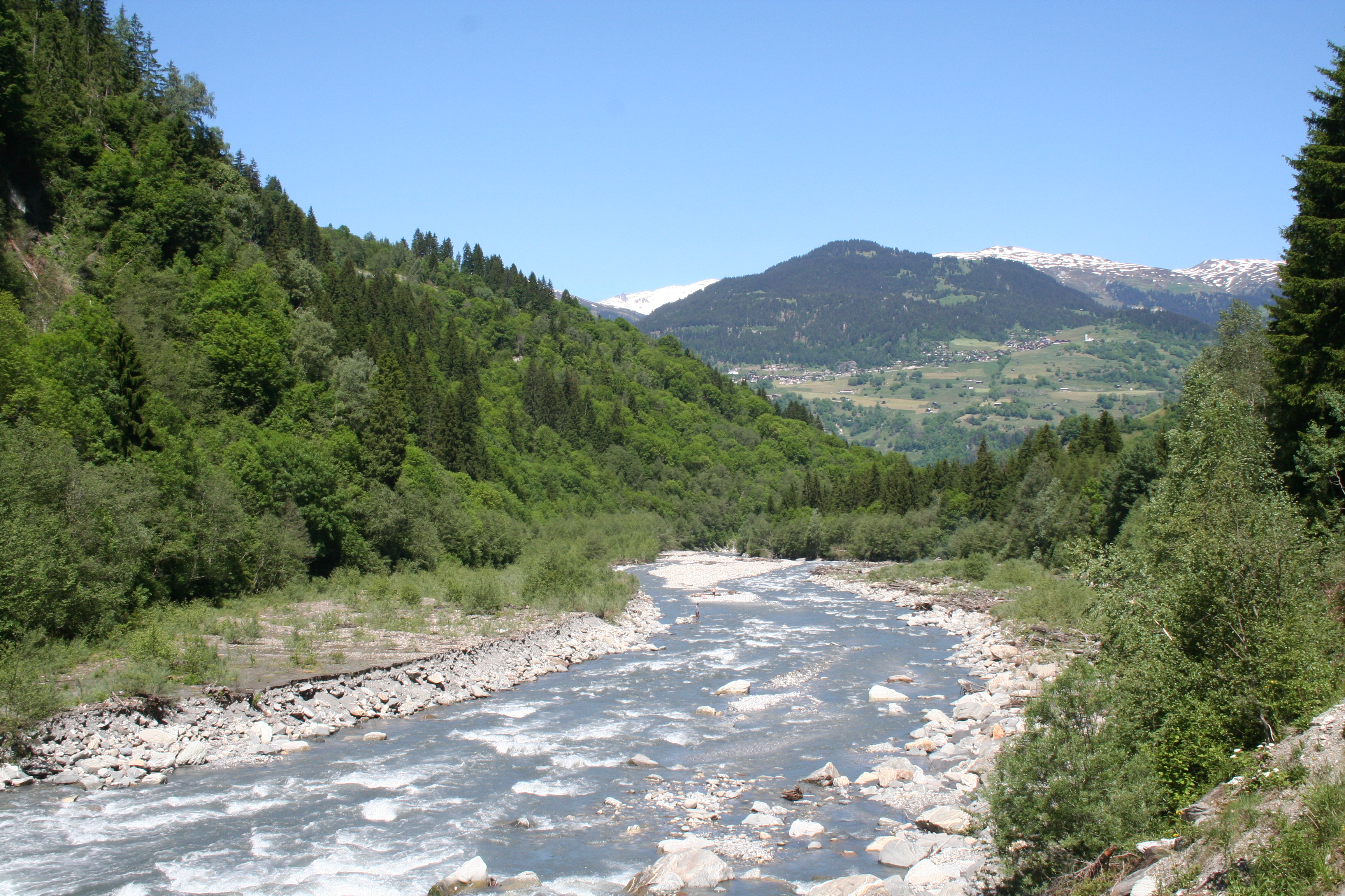 Glenner oberhalb Ilanz